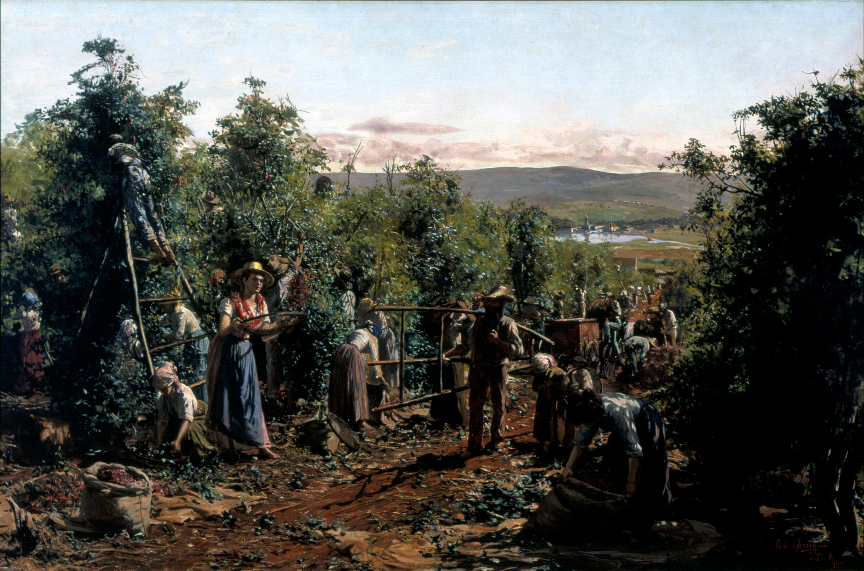 Obra que integra o acervo do Museu Paulista da USP. Coleção Fundo Museu Paulista - FMP